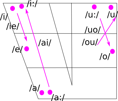 Caribbean English vowel system